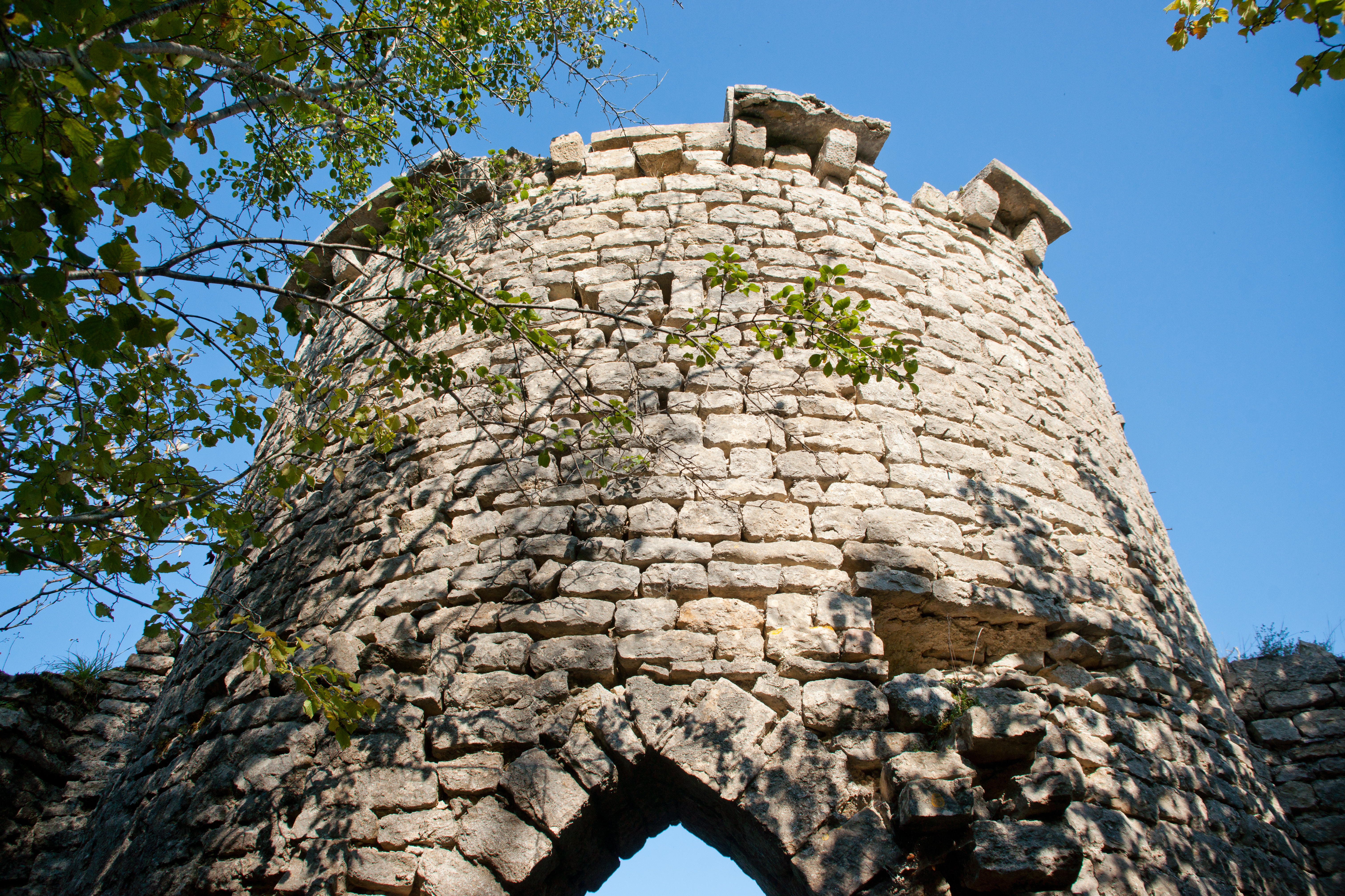 Ruines du château de Charencey .